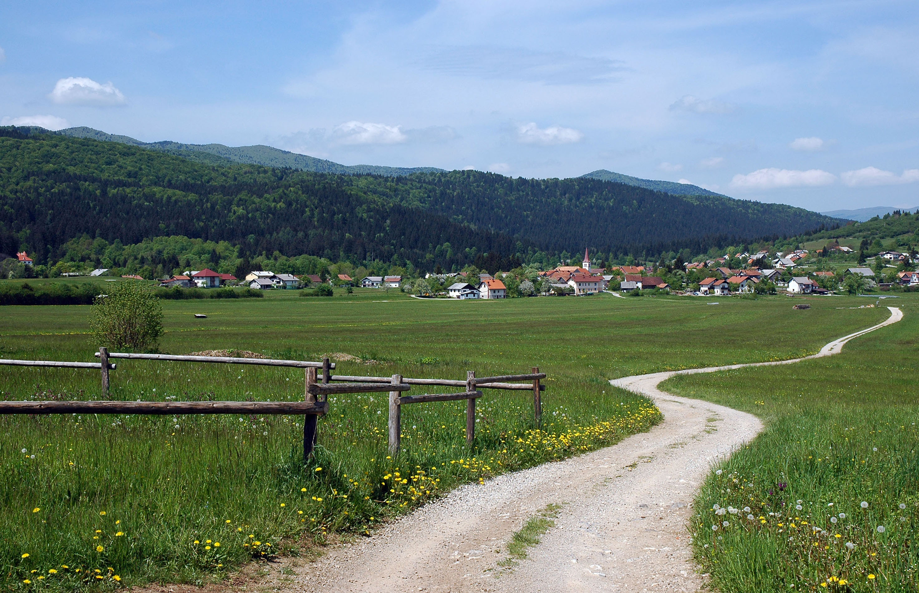 Kozarišče, village in Slovenia